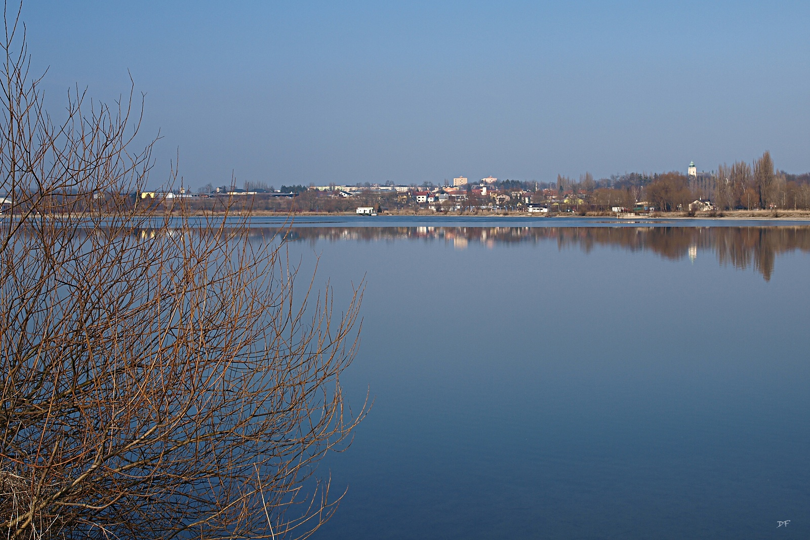 Hlučínské jezero